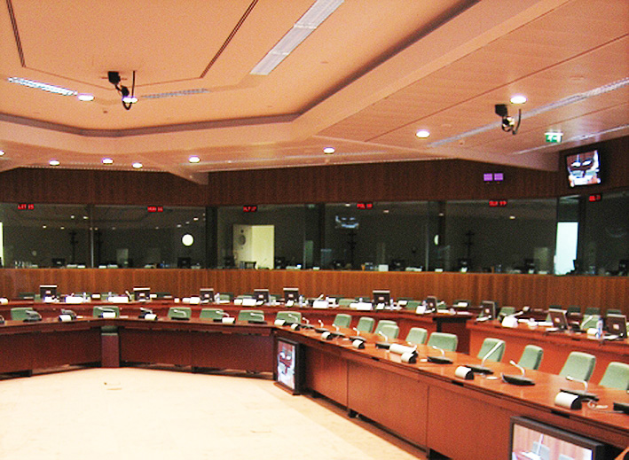 Головна кімната зібрань Ради ЄС, (будівля Юстиса Ліпсія, Брюссель). Використовується Європейським Союзом з дня відкриття 2007 р.